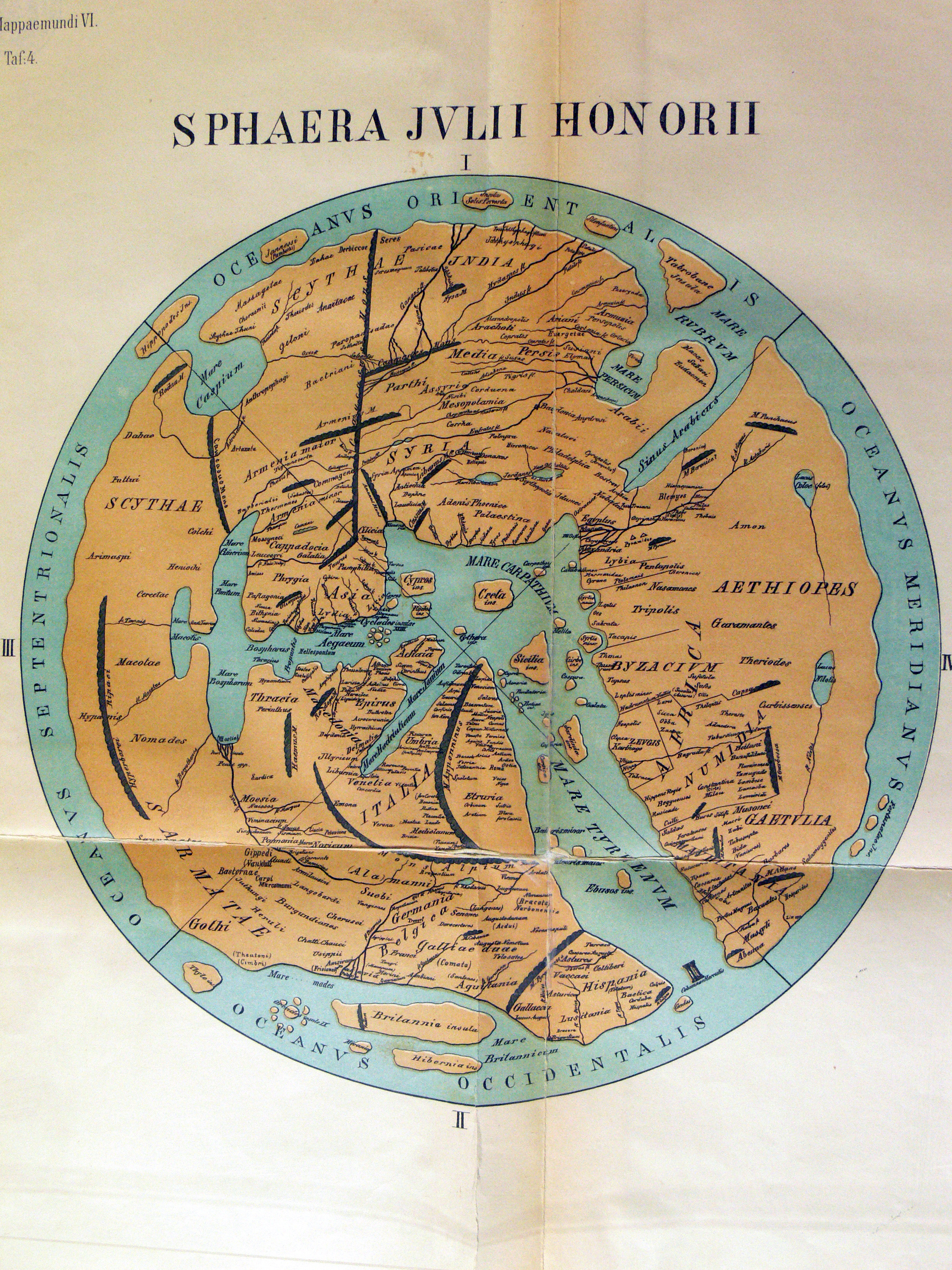 Weltkarte des Julius Honorius